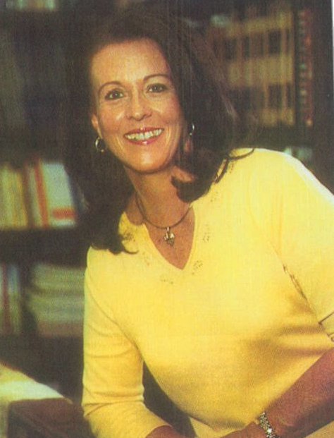 Edna Iturralde como adulto